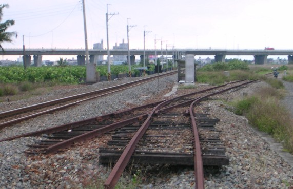 屏東東港線分歧點（Koika拍攝）。